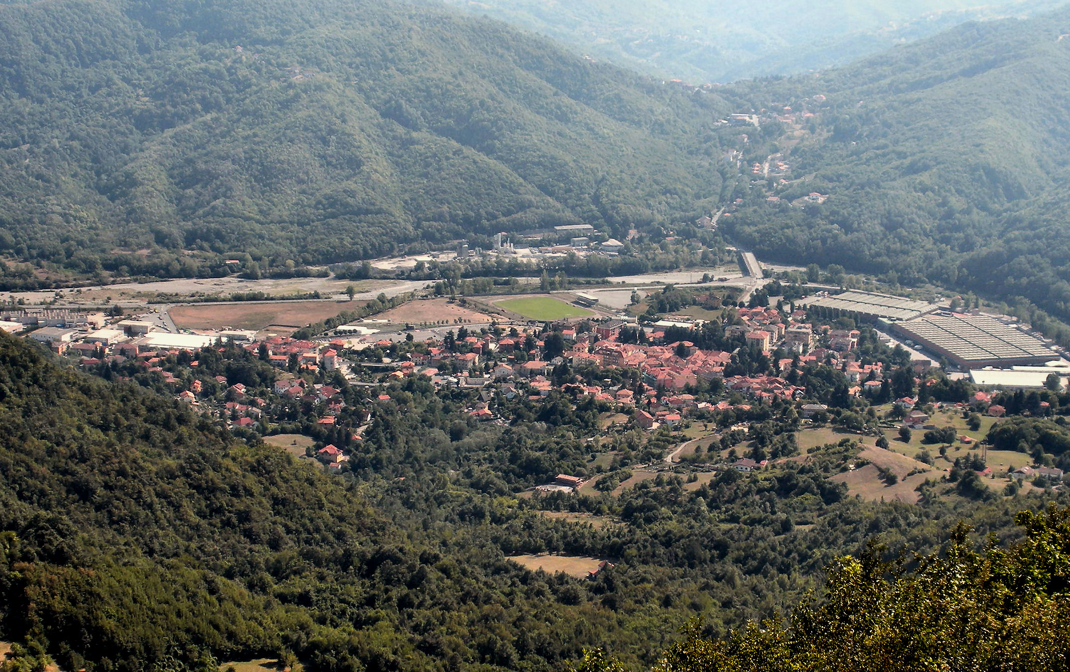 Veduta di Casella (Genova) Foto propria Agosto 2009